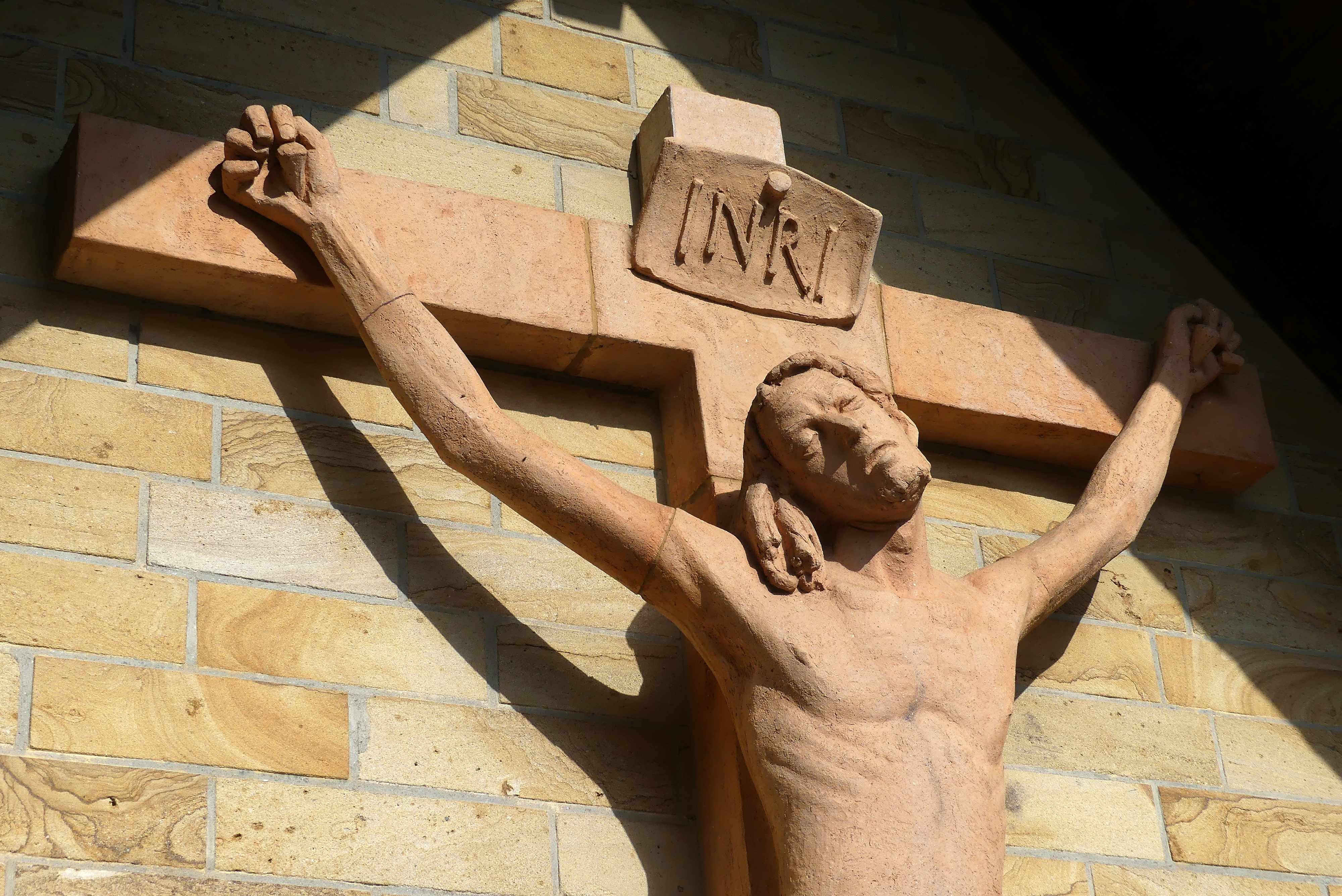 Kreuzigungsgruppe, Terrakotta, 1954, Bildhauer Adam Winter aus Mainz-Kastel - Detail: Jesus